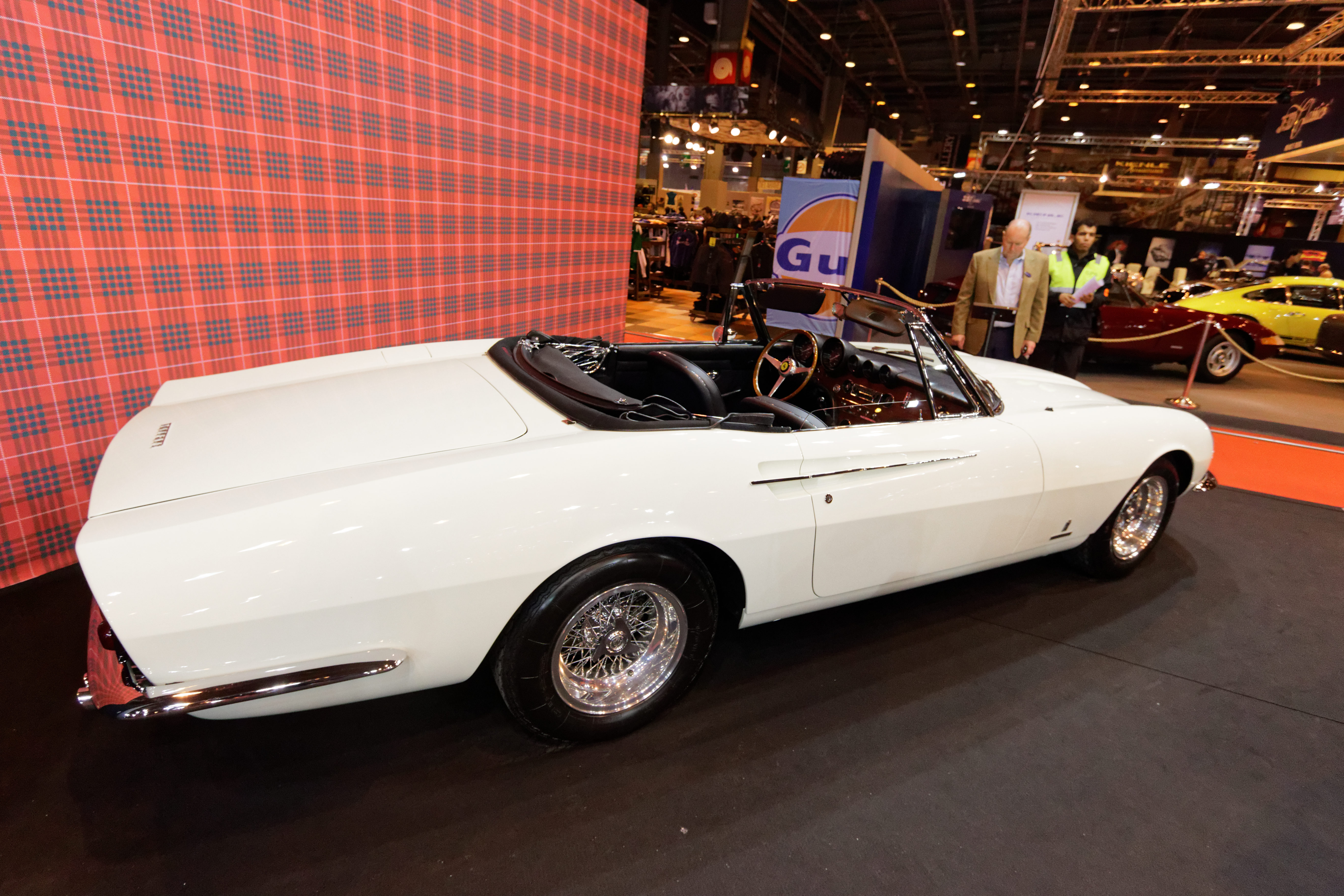 Une Ferrari 365 California de 1966 exposée lors du salon Rétromobile 2016.